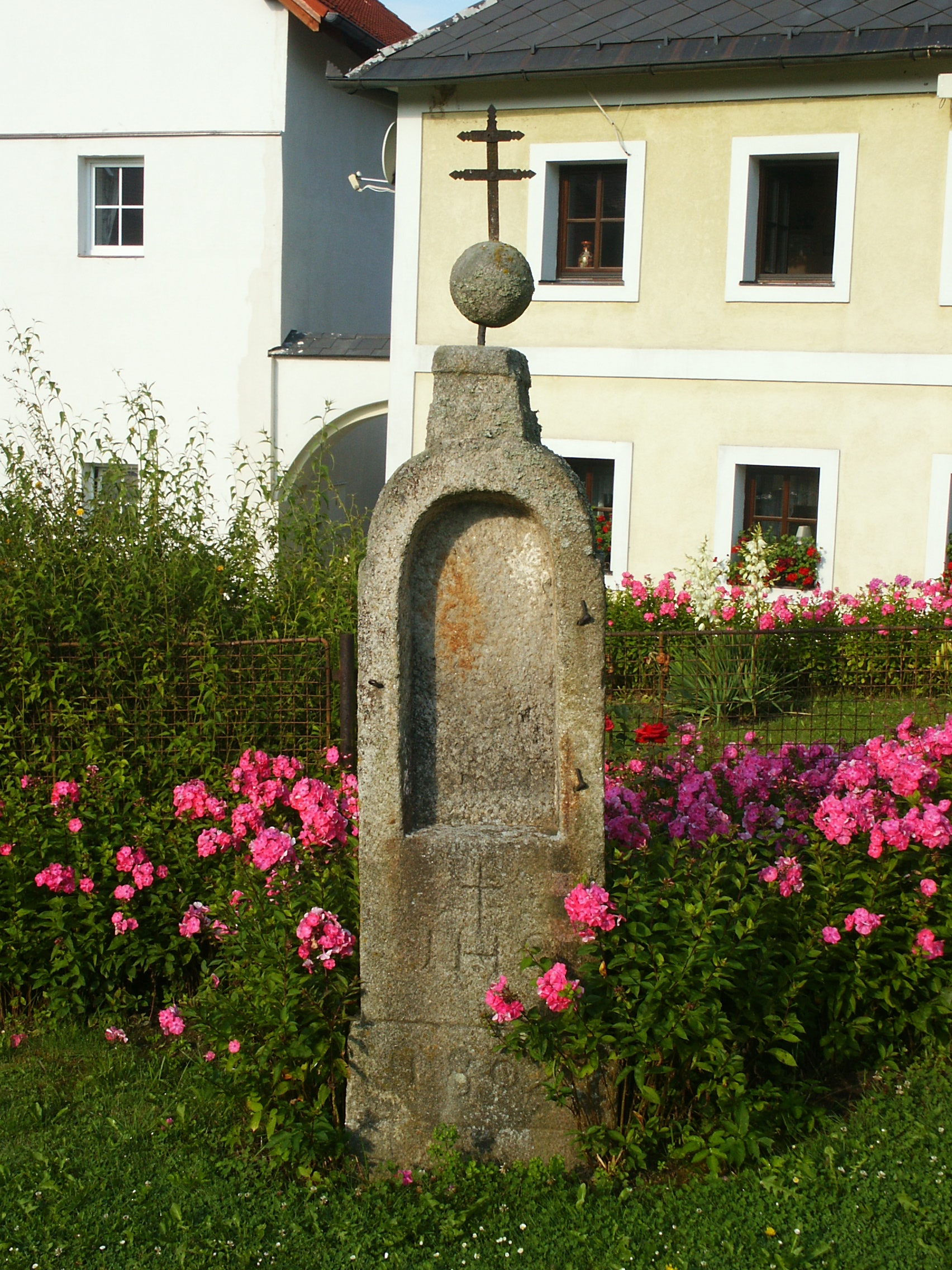 Slupečná - výklenková kaplička v centru obce